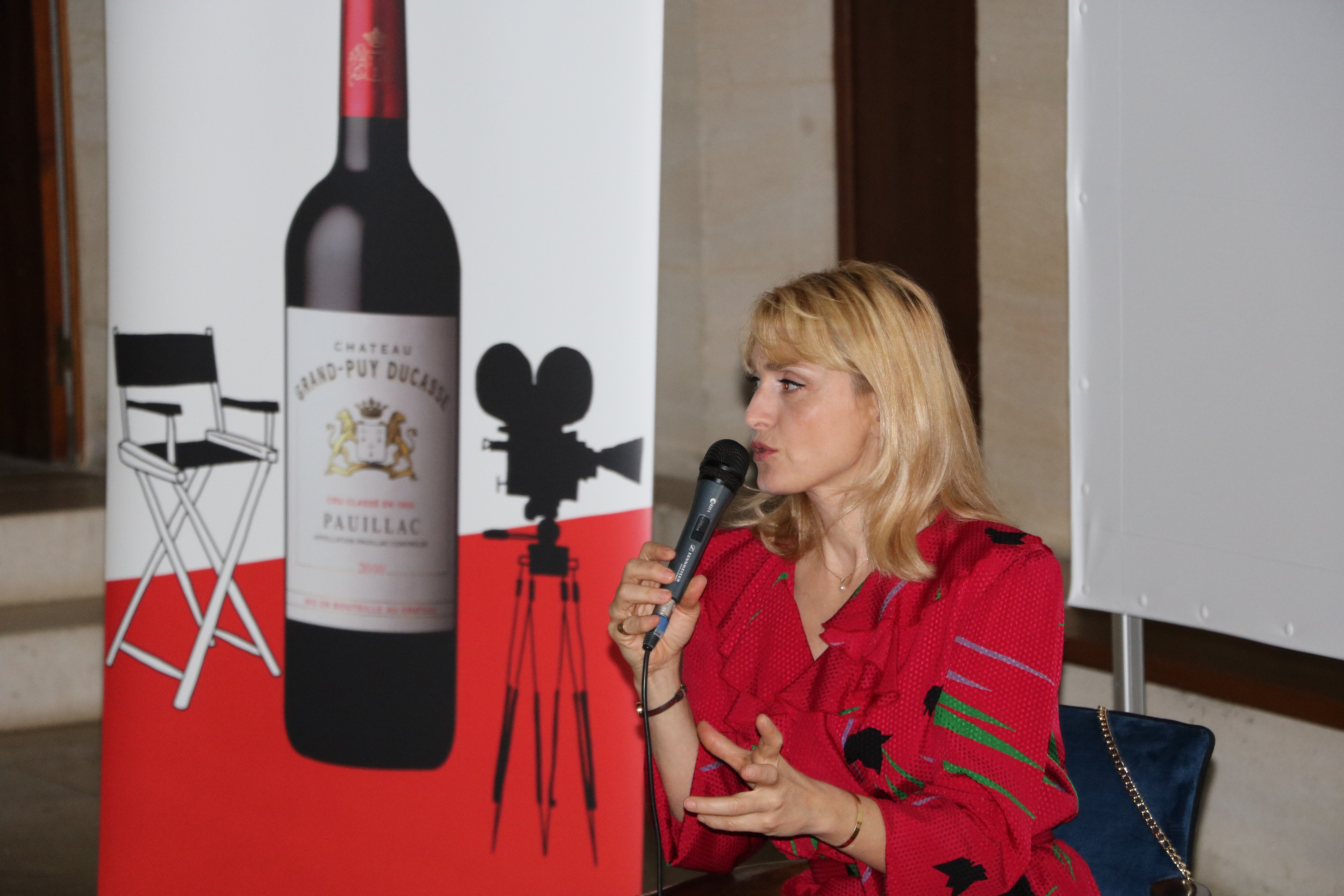 Rencontre avec Julie Gayet au Château Grand-Puy Ducasse de Pauillac durant la cinquième édition du festival (2019)